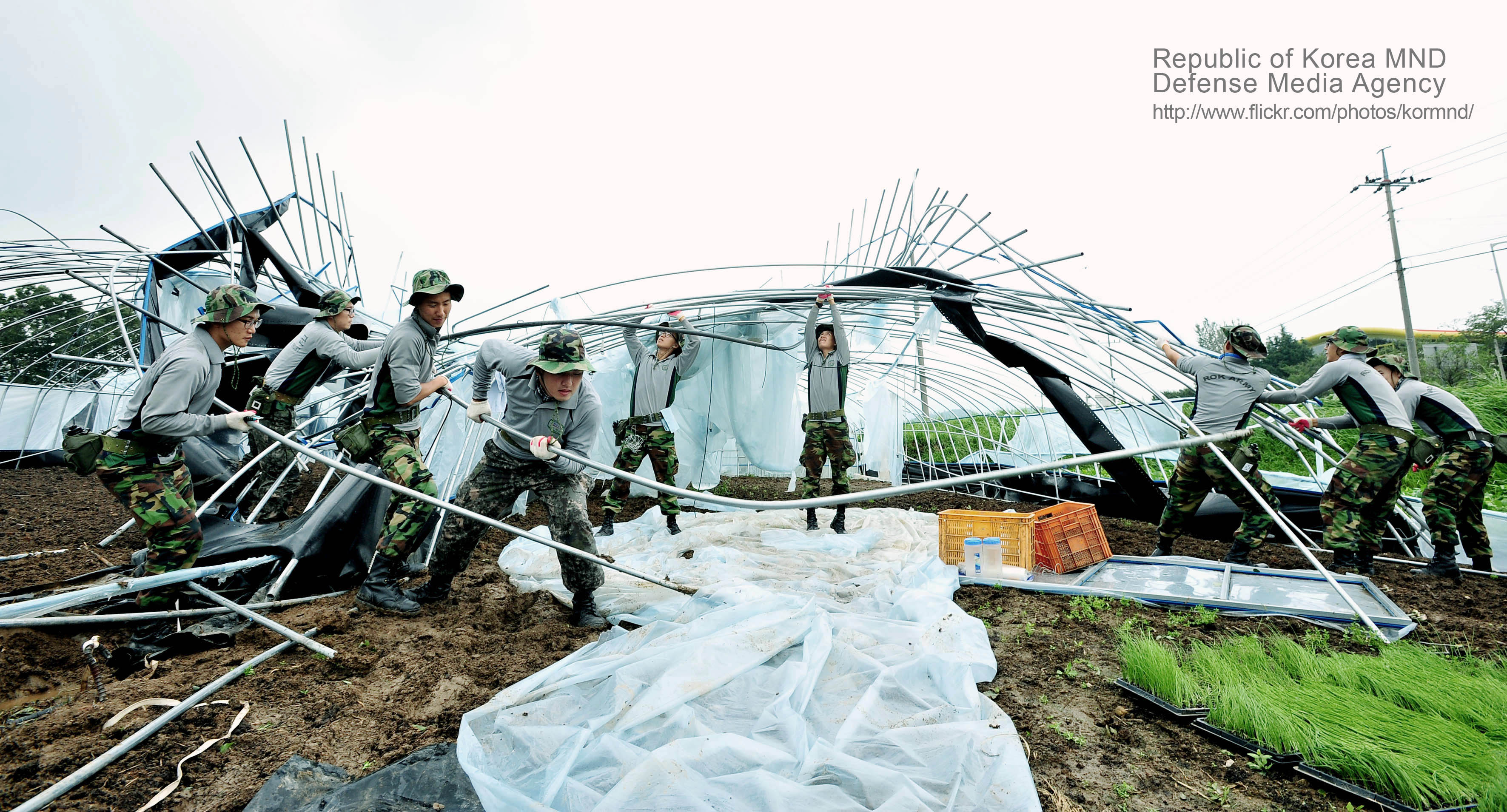 초대형 태풍 볼라벤의 피해 복구를 위해 장병들이 전국 각지에서 굵은 땀방울을 쏟고 있다. 육군 31사단 포병대대 장병들이 29일 오후 전남 곡성군 삼기면 원등리에서 쓰러진 비닐하우스 철거작업을 하고 있다. 촬영-박흥배 기자